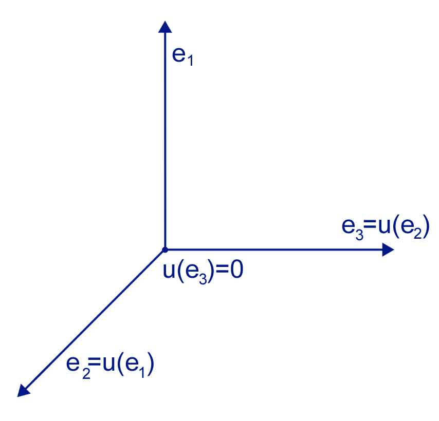 Summary Image de la base d'un endomorphisme nilpotent. Permet d'illustrer graphiquement la défnition. Jean-Luc W 24 avril 2006 à 09:24 (CEST)